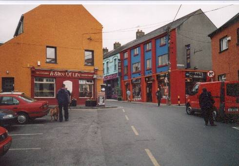 Straße im Zentrum von Athlone